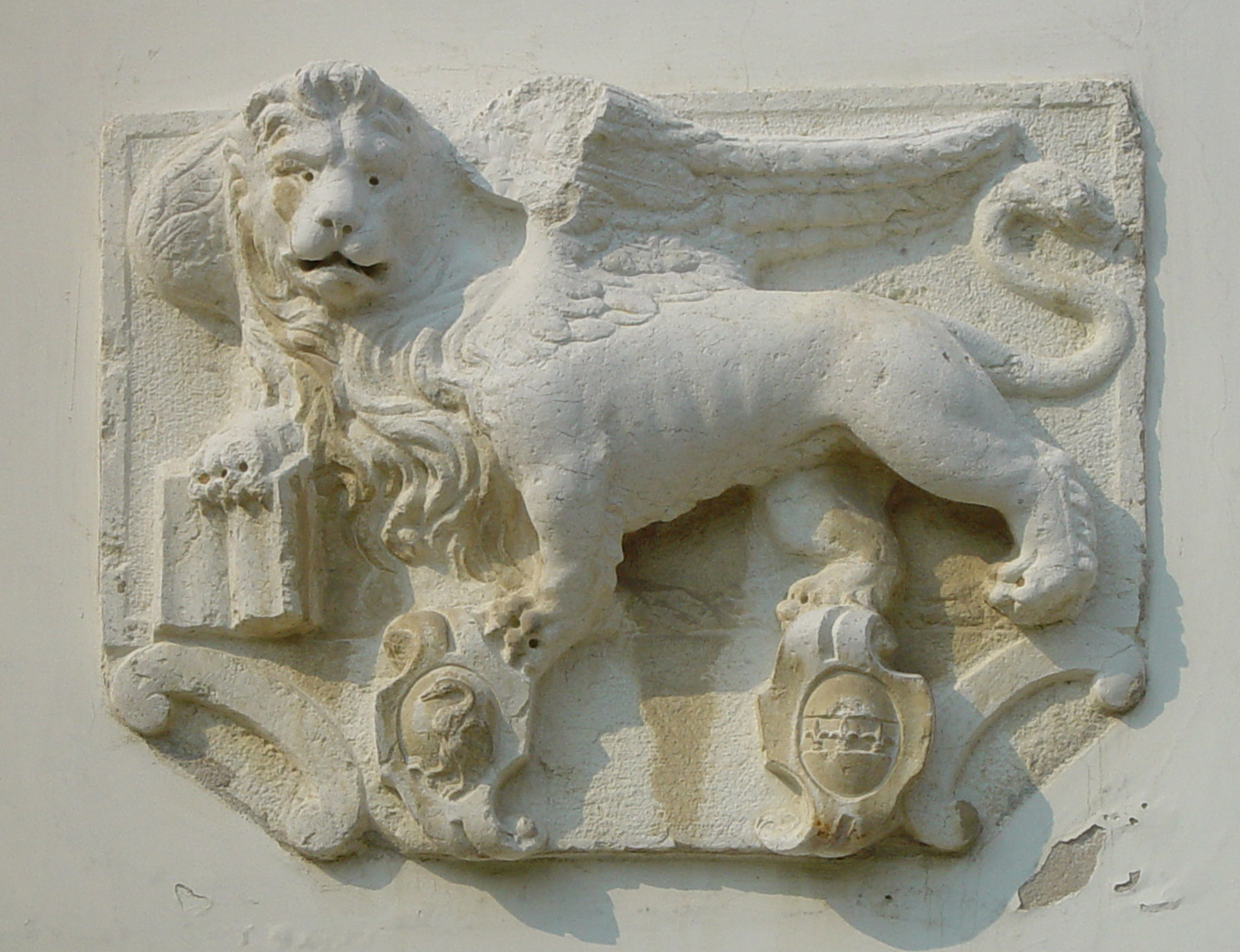 Mirano: altorilievo del Leone di San Marco.